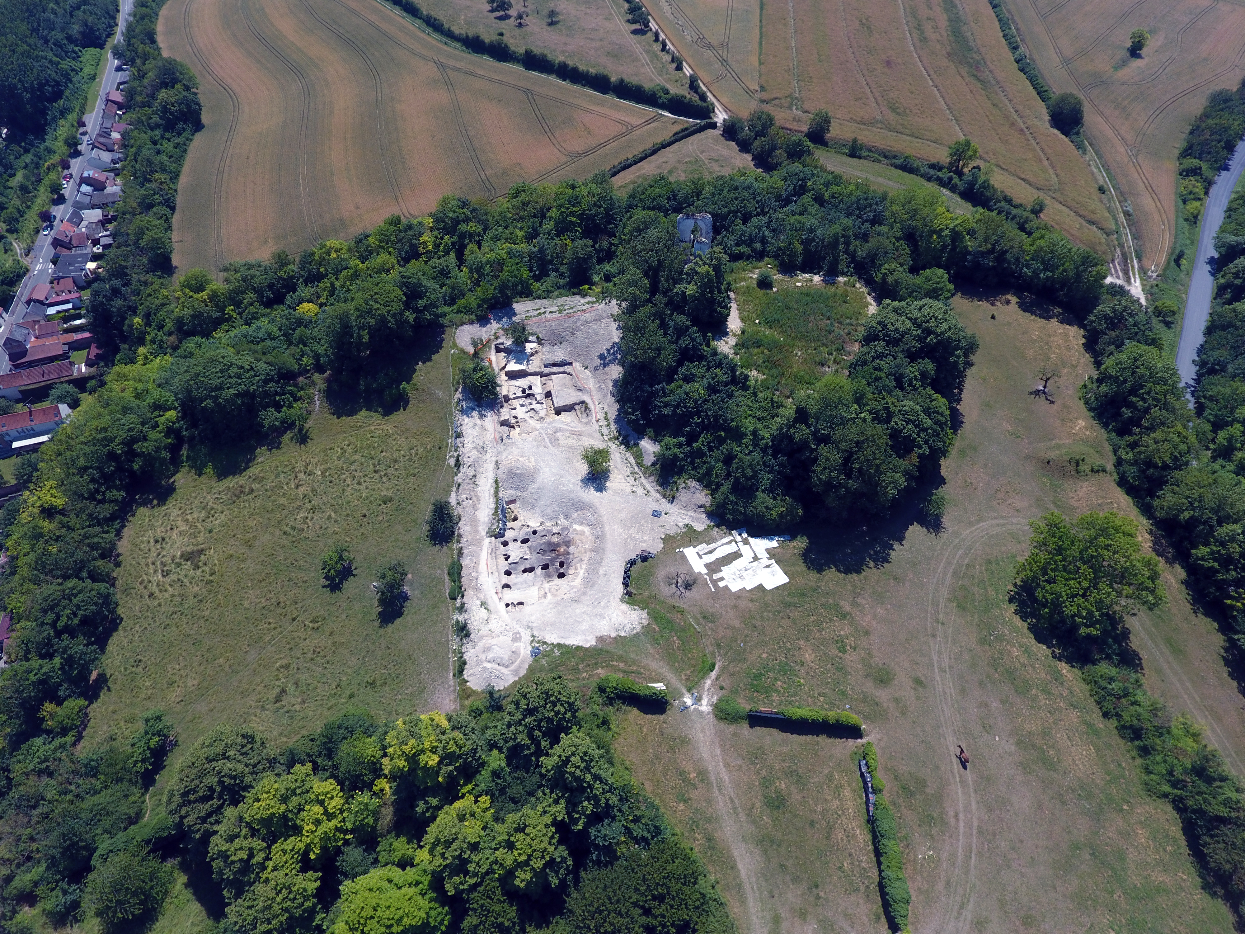 Vue générale des fouilles archéologiques de la première enceinte en juin 2018